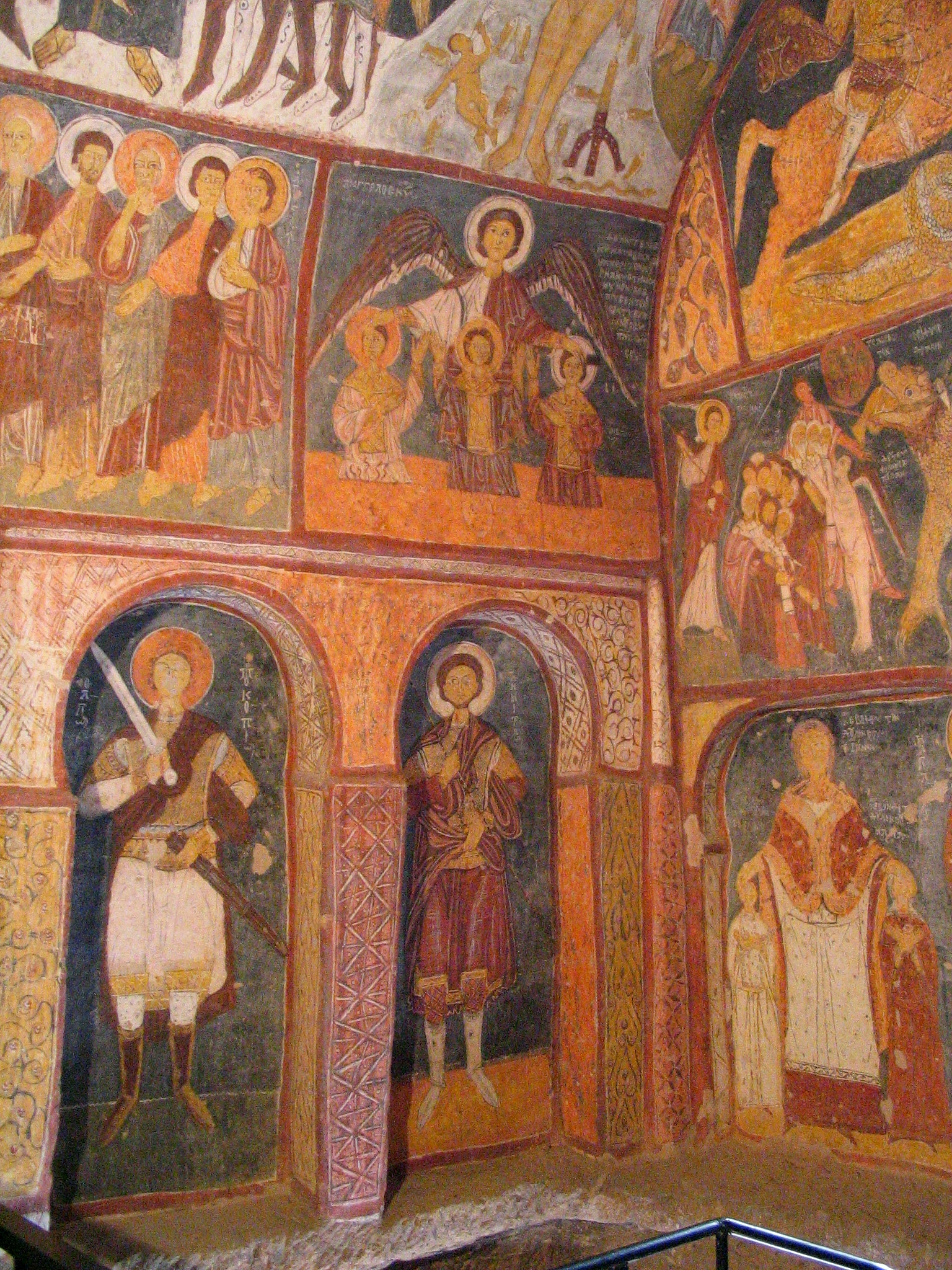 Fresken in der Johanneskirche bei Gülsehir, Kappadokien, Zentraltürkei